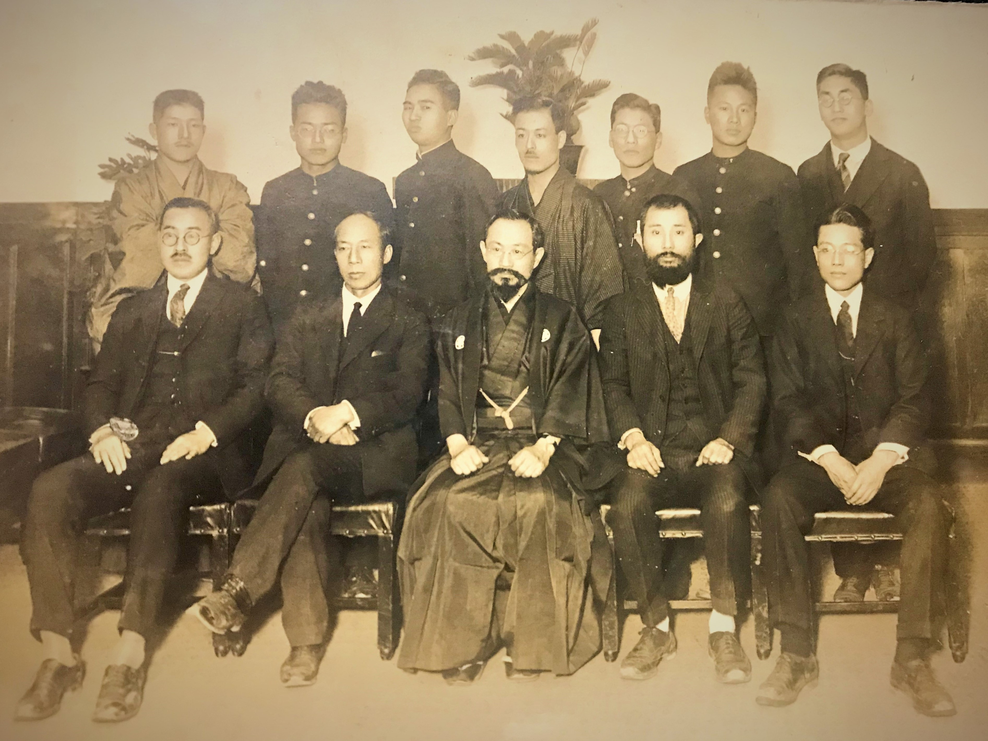 山岡萬之助日本大学総長(前列中央)、英義彦學監(総長の右隣り)、日本大学学生たち 1932年ごろ日本大学で撮影